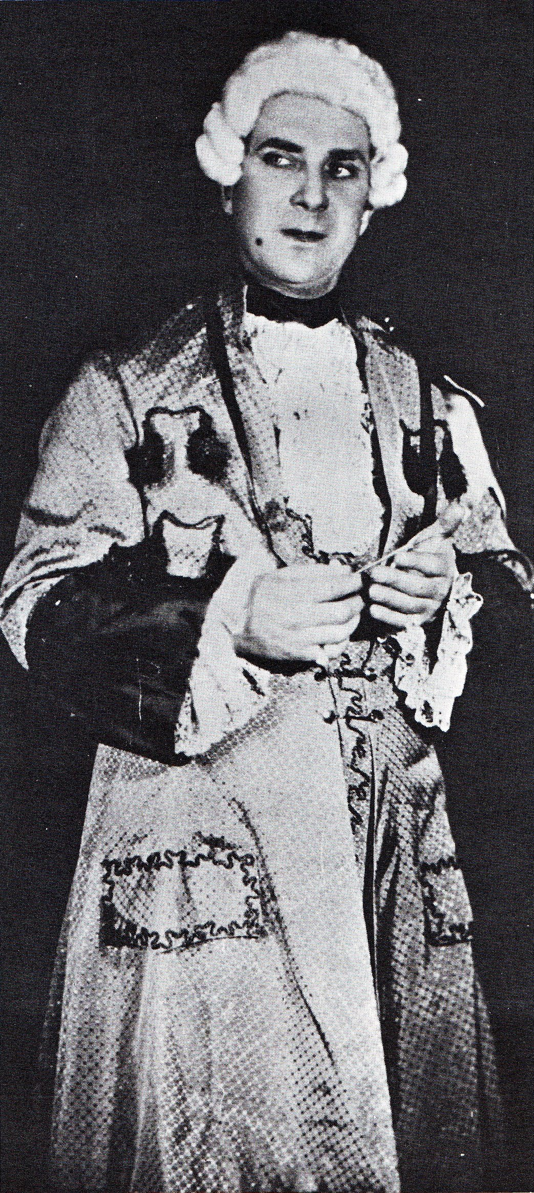 Paul de Groot soos hy verskyn het in Dumas se Gerieflike huwelik in 1928.